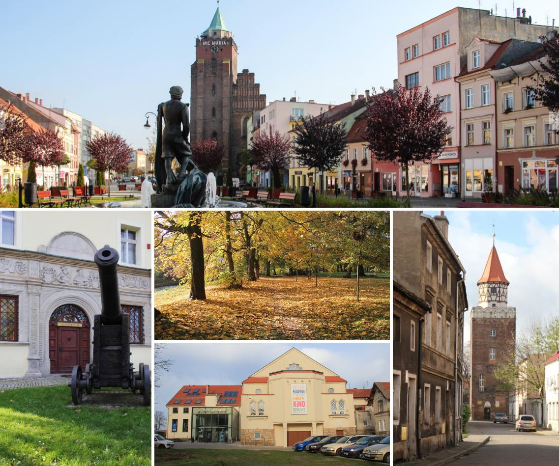 Rynek, Zamek Piastowski, Park Śródmiejski, Dom Kultury, Baszta Tkaczy